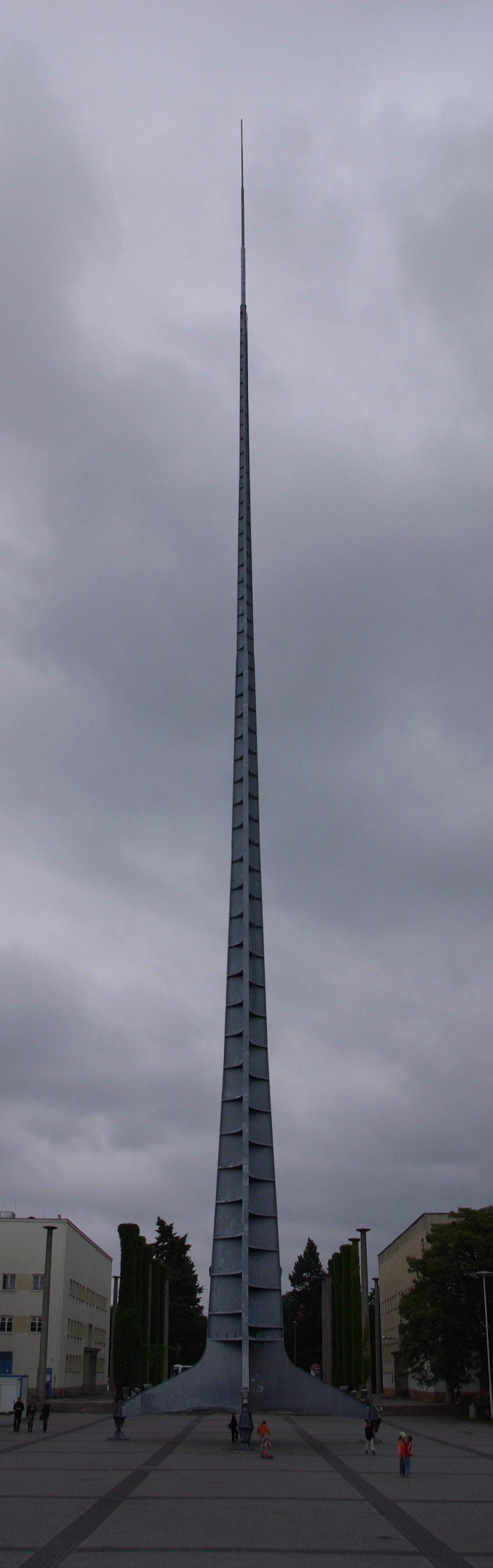 Iglica in Breslau